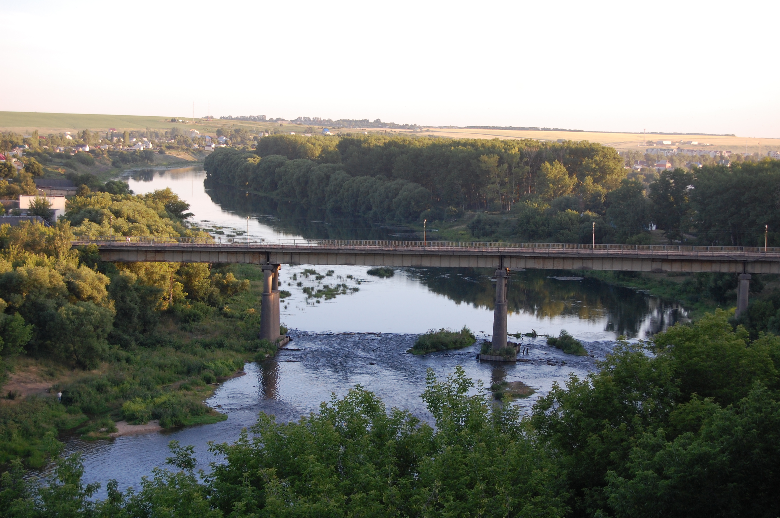 Вид на реку Сосна (г. Ливны, Орловская обл.)